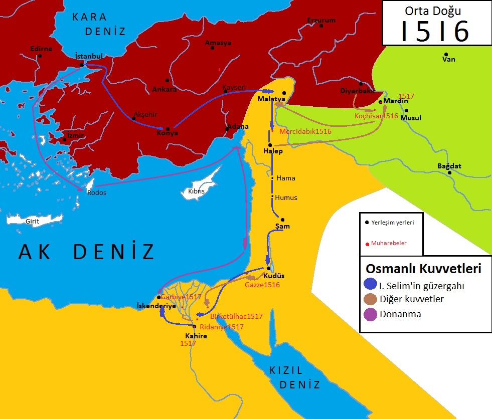 1516-1517 yıllarında gerçekleşen Büyük Mısır Seferi'nin sefer haritası.